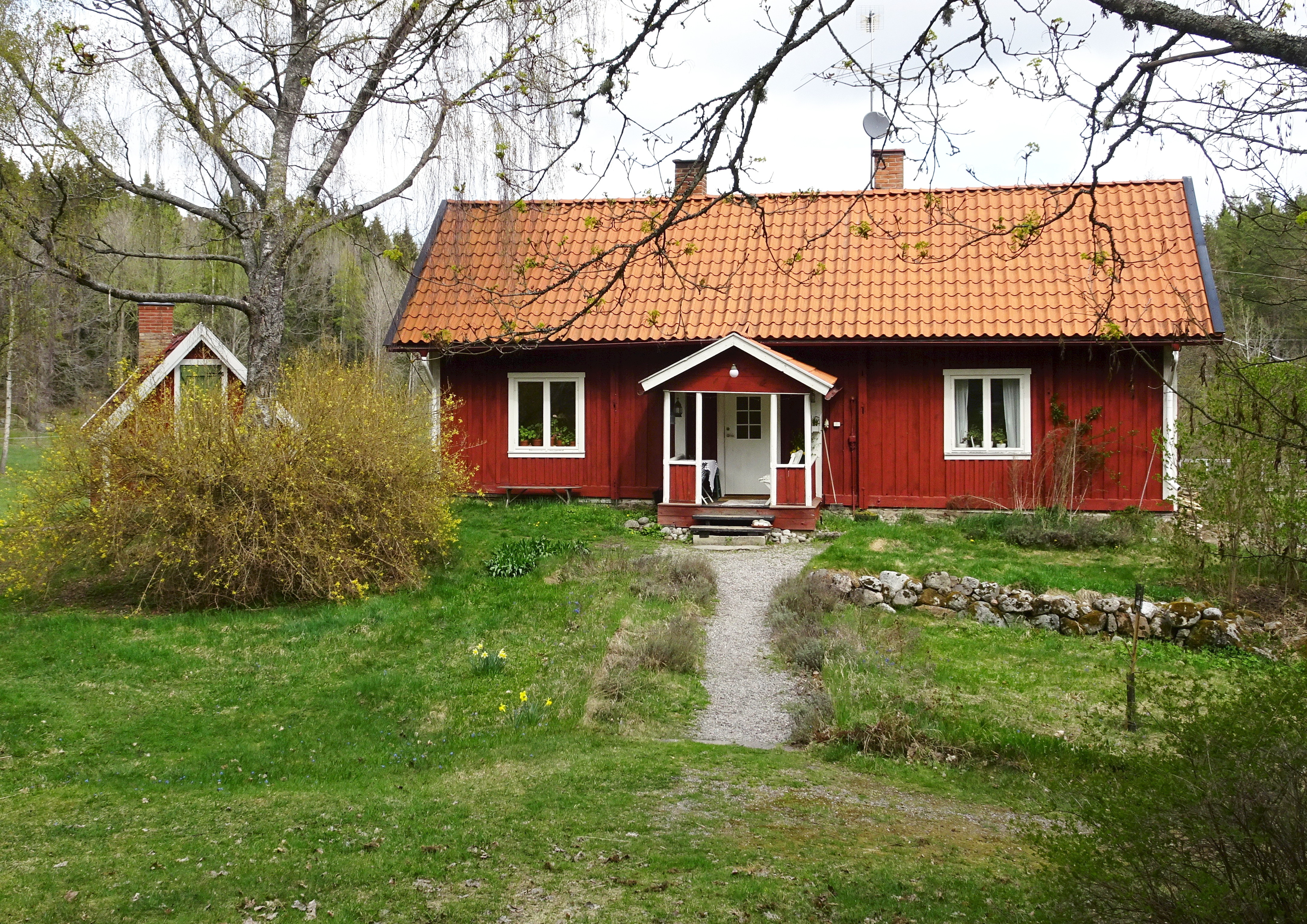 Fullersta kvarns kvarntorptorp